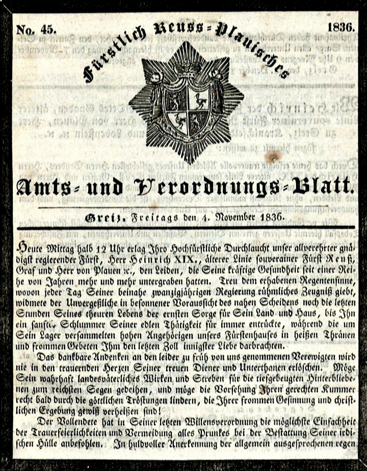 Zeitungsanzeige von 1836 bezüglich des Todes von Heinrich XIX., von Gottes Gnaden, älterer Linie souveräner Fürst Reuß, Graf und Herr von Plauen, Herr zu Greiz, Kranichfeld, Gera, Schleiz und Lobenstein etc. etc. am 31. Oktober 1836